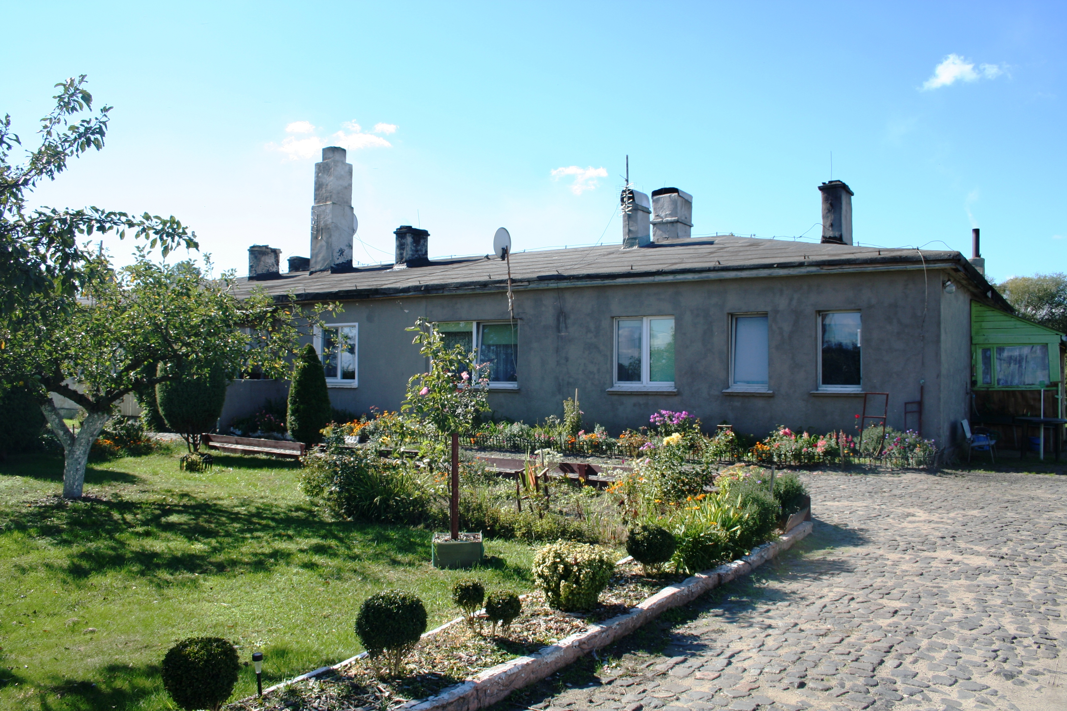 Budynek byłej strażnicy WOP Przyrzecze/Odra. (6)